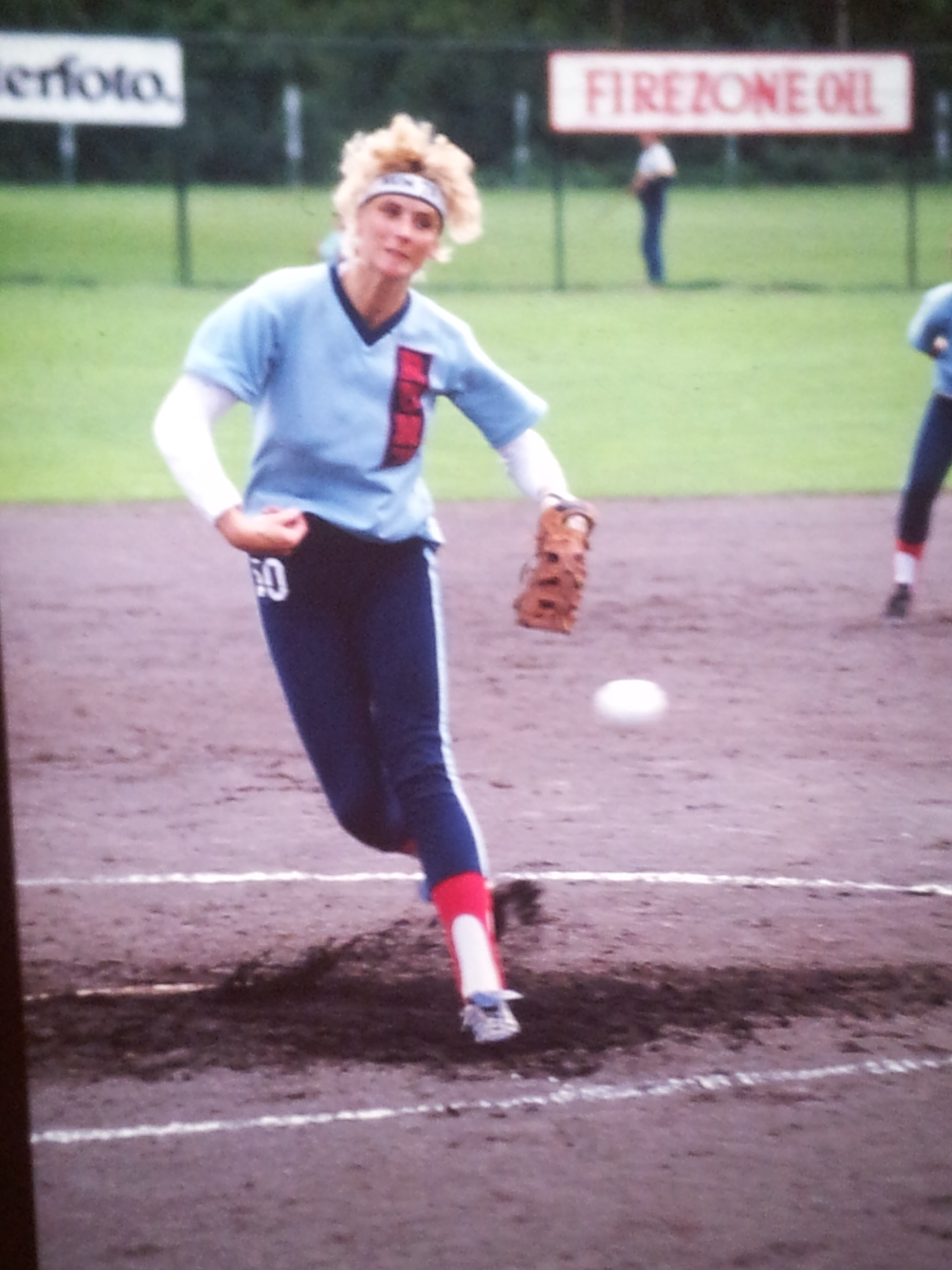 Karin Brookhuis in actie als pitcher bij Run 71 ('84).